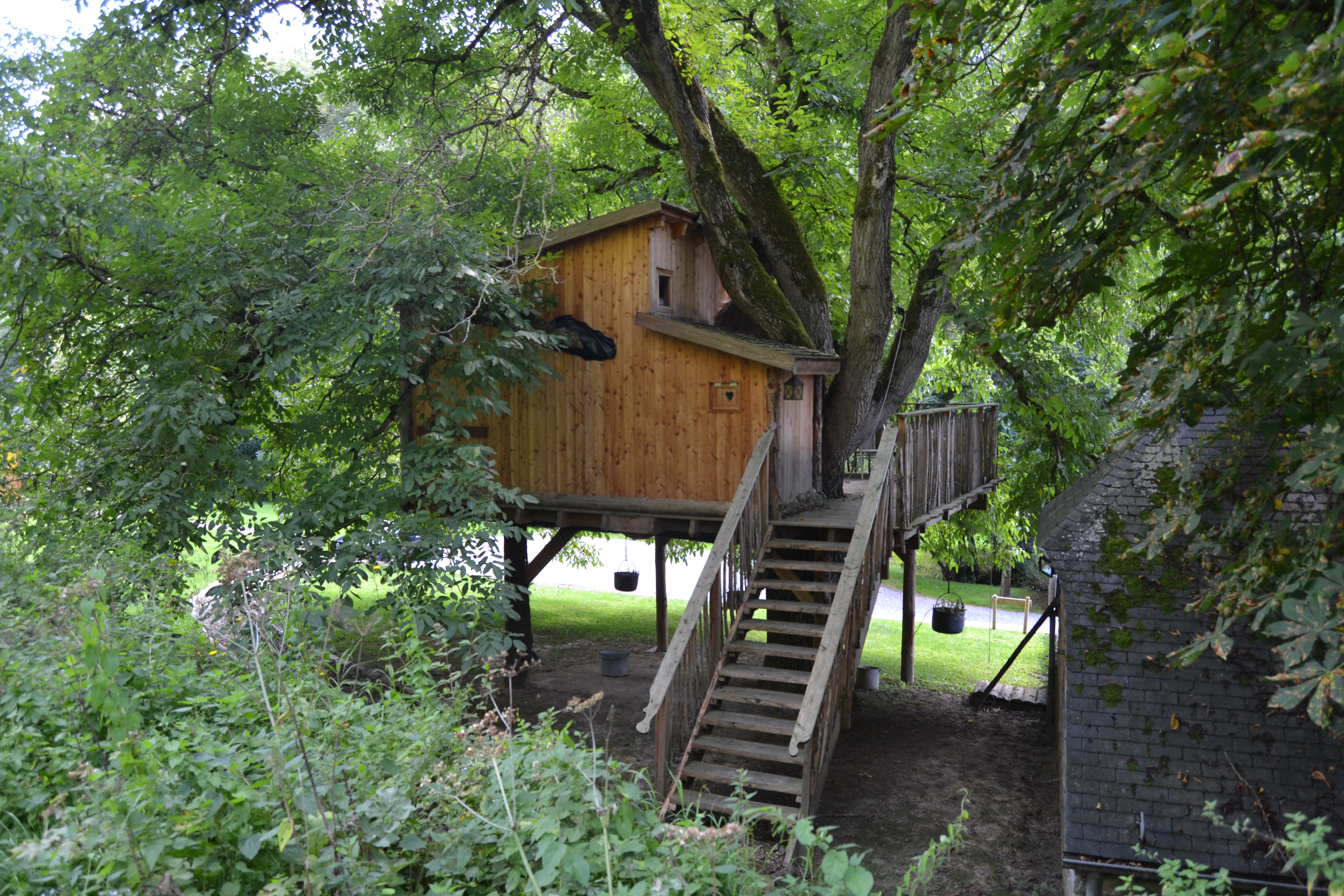 Le Sercret de Manon